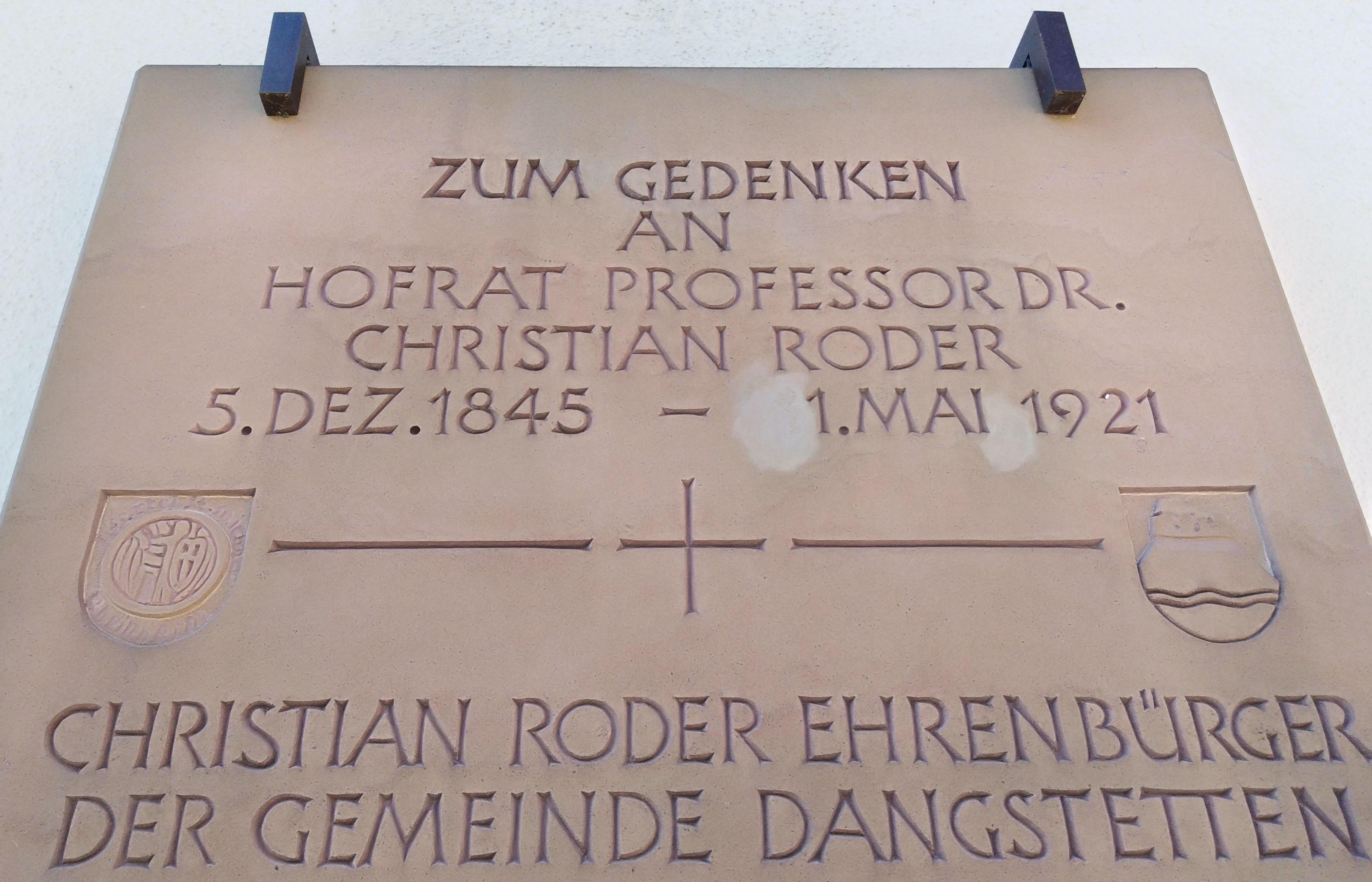 Ortschaft Dangstetten,Ortsteil der Gemeinde Küssaberg im Landkreis Waldshut in Baden-Württemberg. Kopf der Ehrentafel Christian Roder an der Kapelle.